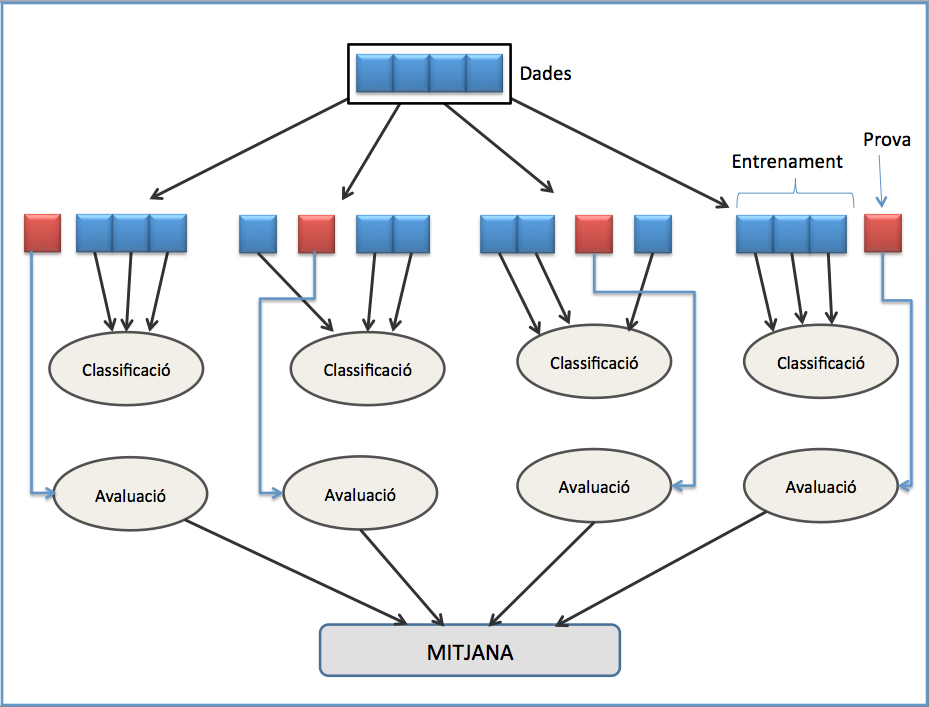 Esquema de la validació creuada de k iteracions